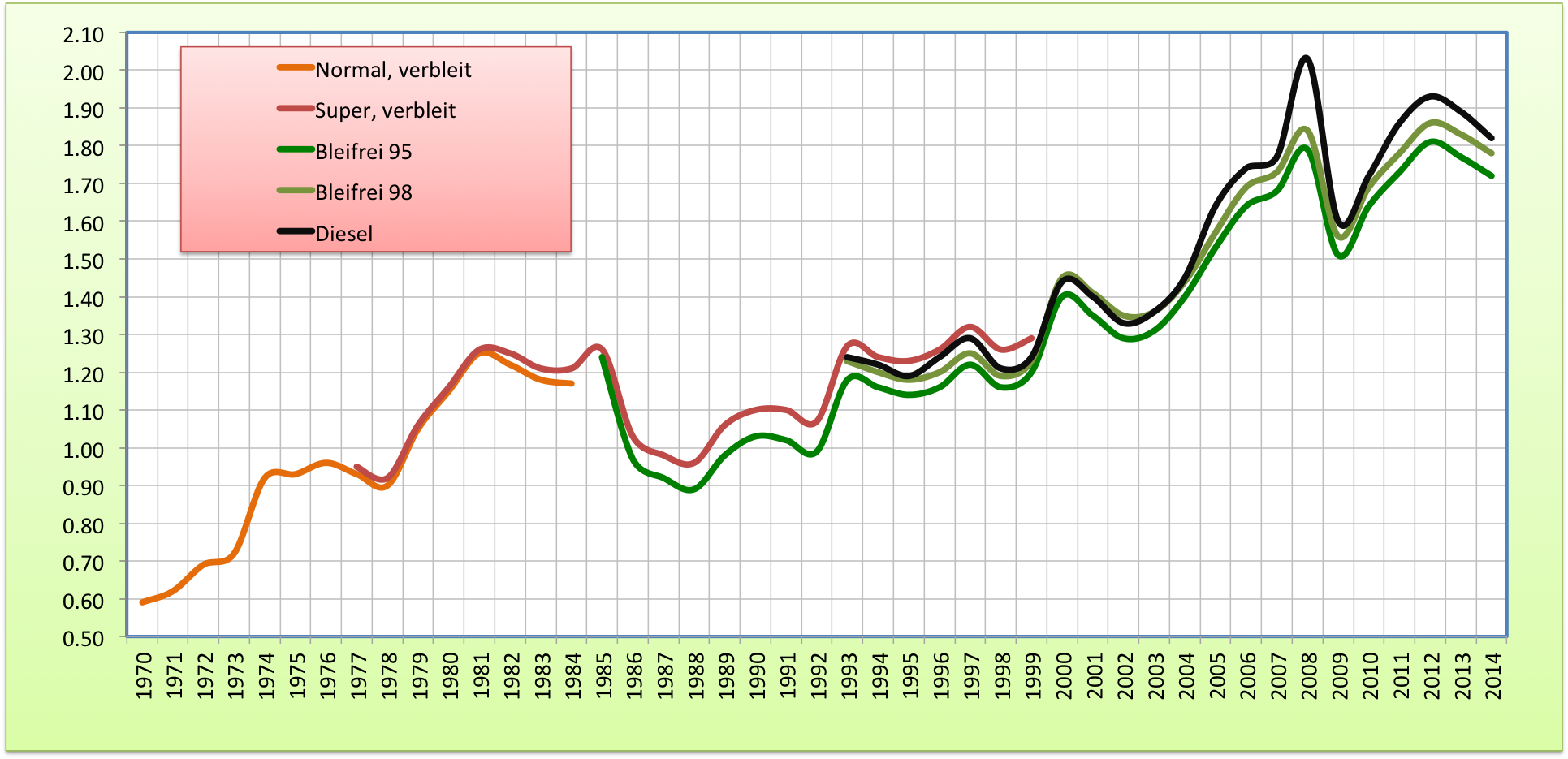 Benzinpreisentwicklung Schweiz 1970-2009 Selbsterstellt von Filzstift Datenquelle: Bundesamt für Statistik, Landesindex der Konsumentenpreise – Indikatoren, LIK, Durchschnittspreise für Benzin und Diesel, Jahreswerte. Rohdaten Hinweise: Von 1970 - 1976 wurde nur Normalbenzin erhoben, die Preise für Superbenzin lagen während dieser Periode rund 4 - 5 Rappen höher, de 1970 à 1976, seul le prix de l'essence normale était relevé. Durant cette période, les prix de l'essence super étaient supérieurs d'environ 4-5 cts. 1977: Preis vom Oktober 1977 / Prix d'octobre 1977 1993: Durchschnittspreis Juni 1993 - Dezember 1993 (Indexrevision) / Prix moyens de juin 1993 à décembre 1993 (révision de l'indice) Super, verbleit / super avec plomb: Ab Januar 2000 nicht mehr im Verkauf / n'est plus en vente depuis janvier 2000.